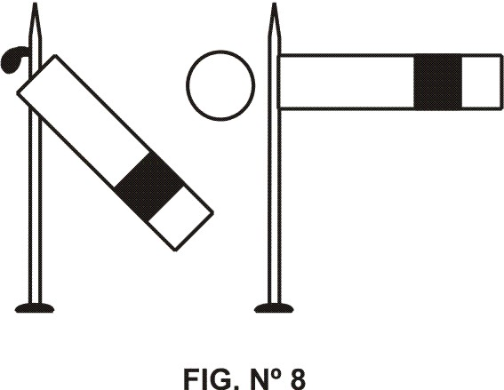 Son brazos de señales ferroviarias argentinas vistas de la parte trasera o sea la que el tren no puede ver.